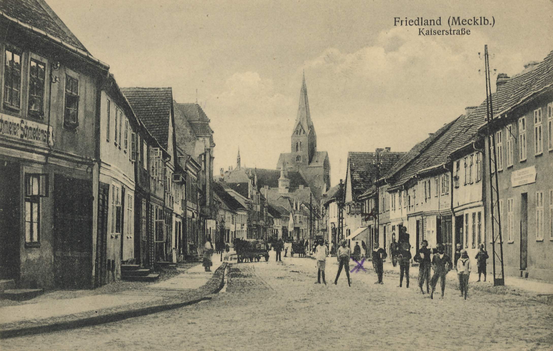 Kaiserstraße